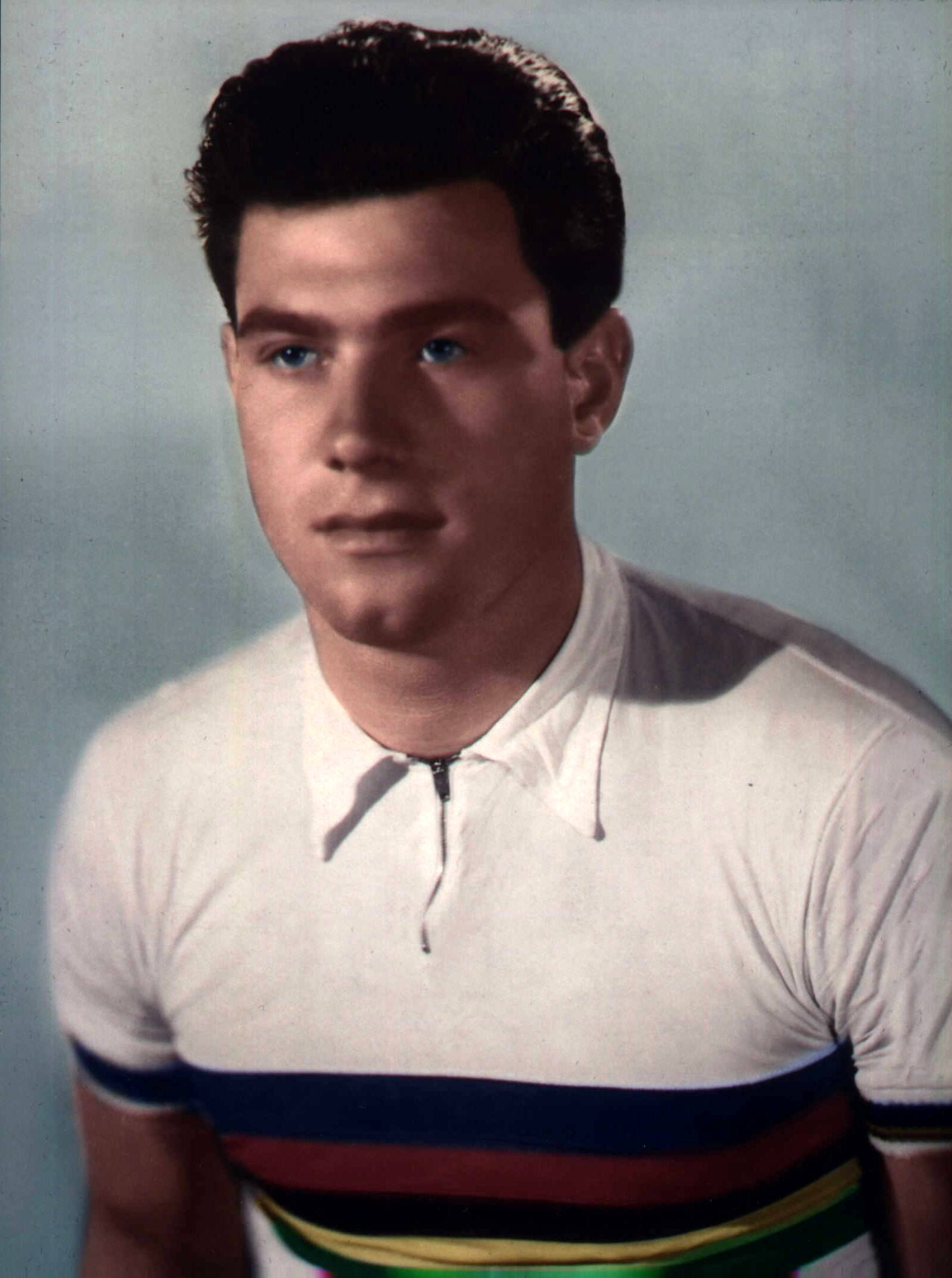 Colorazione della foto originale in bianco e nero